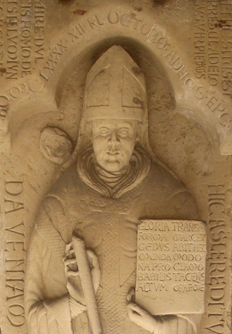 Hildesheim, Domkreuzgang, Grabplatte des Bischofs Adelog, Detail